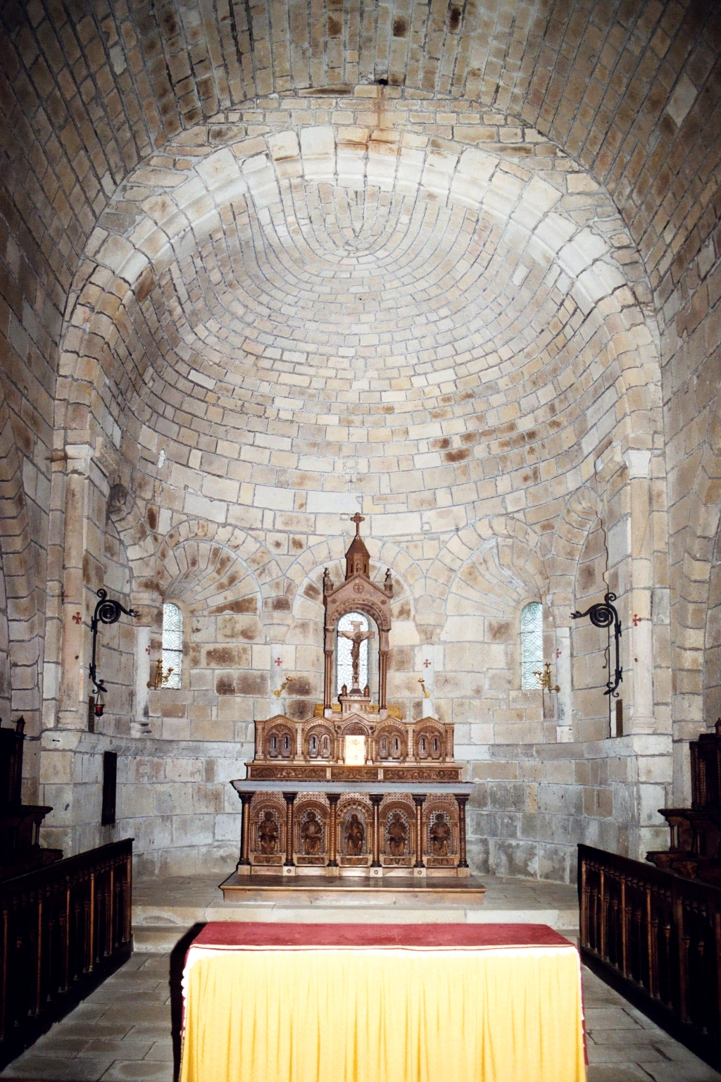 France - Auvergne - Cantal - Église Saint-Georges d'Ydes-Bourg